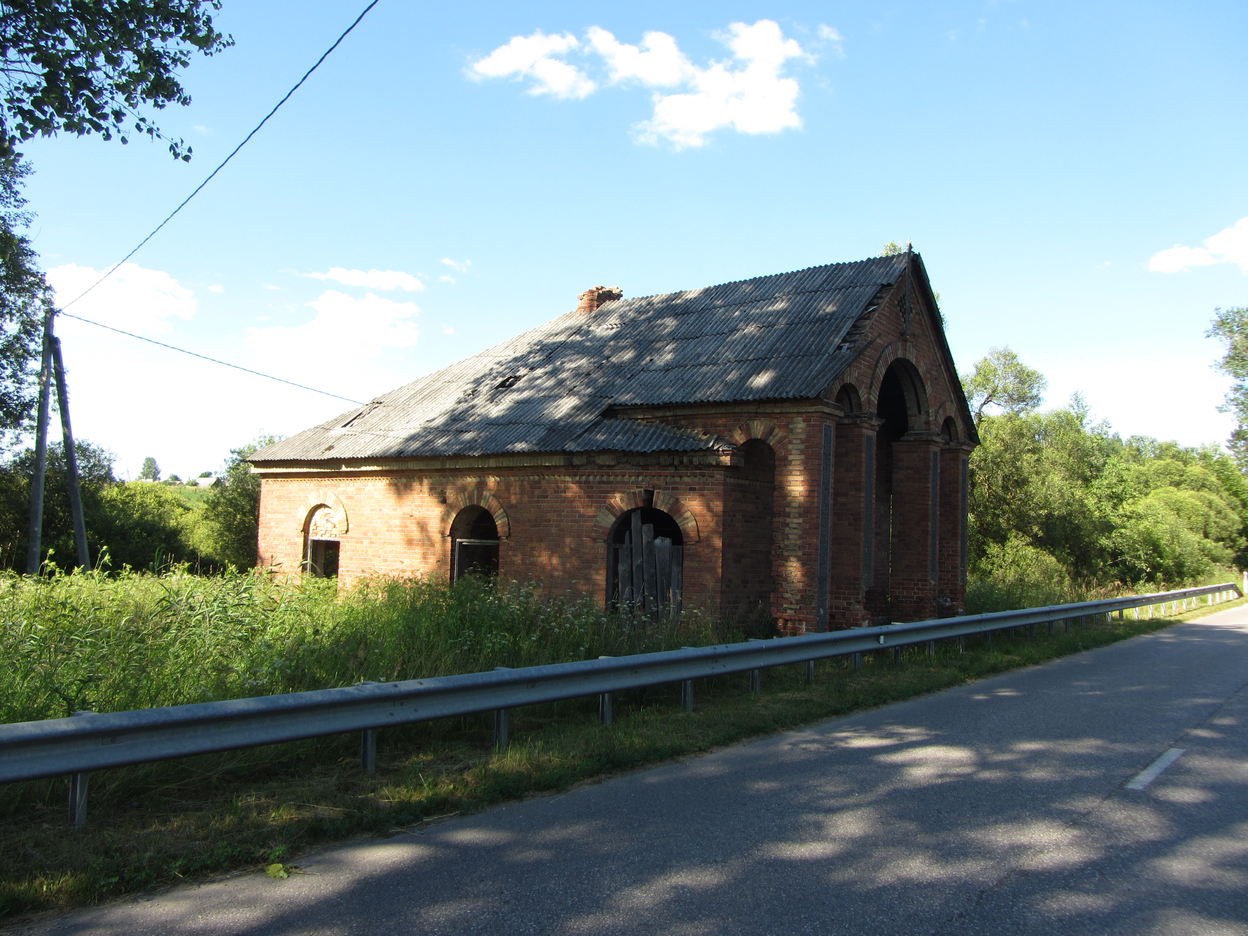 Šešuolėliai II, Lithuania